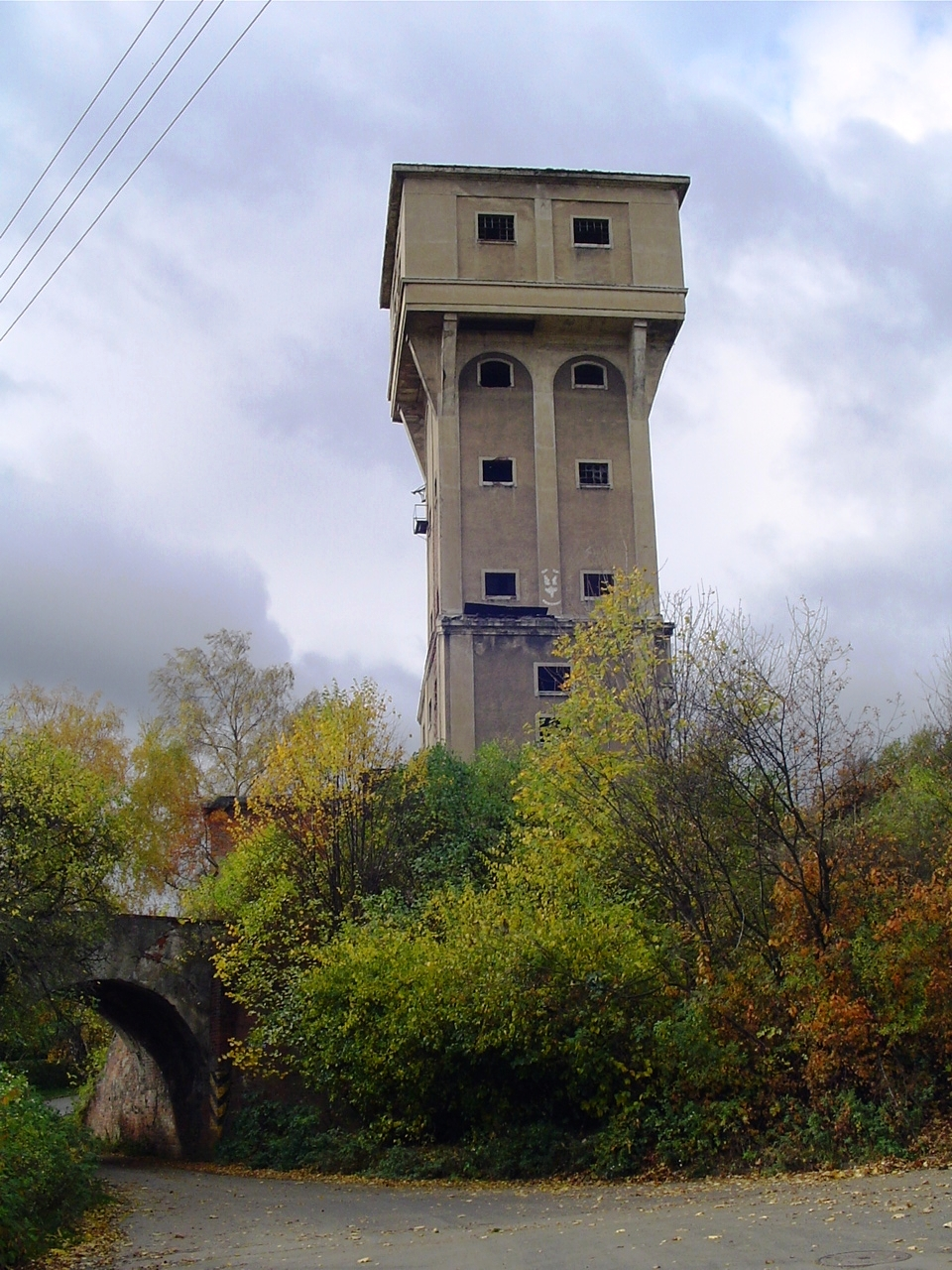 Wałbrzych, ul. Kopalniana 2 - zespół szybu „Tytus”, pocz. XX w.: - wieża nadszybowa, - łaźnia, - lampiarnia, - markowniaZabytek nr 818/WŁ z 25.08.1981